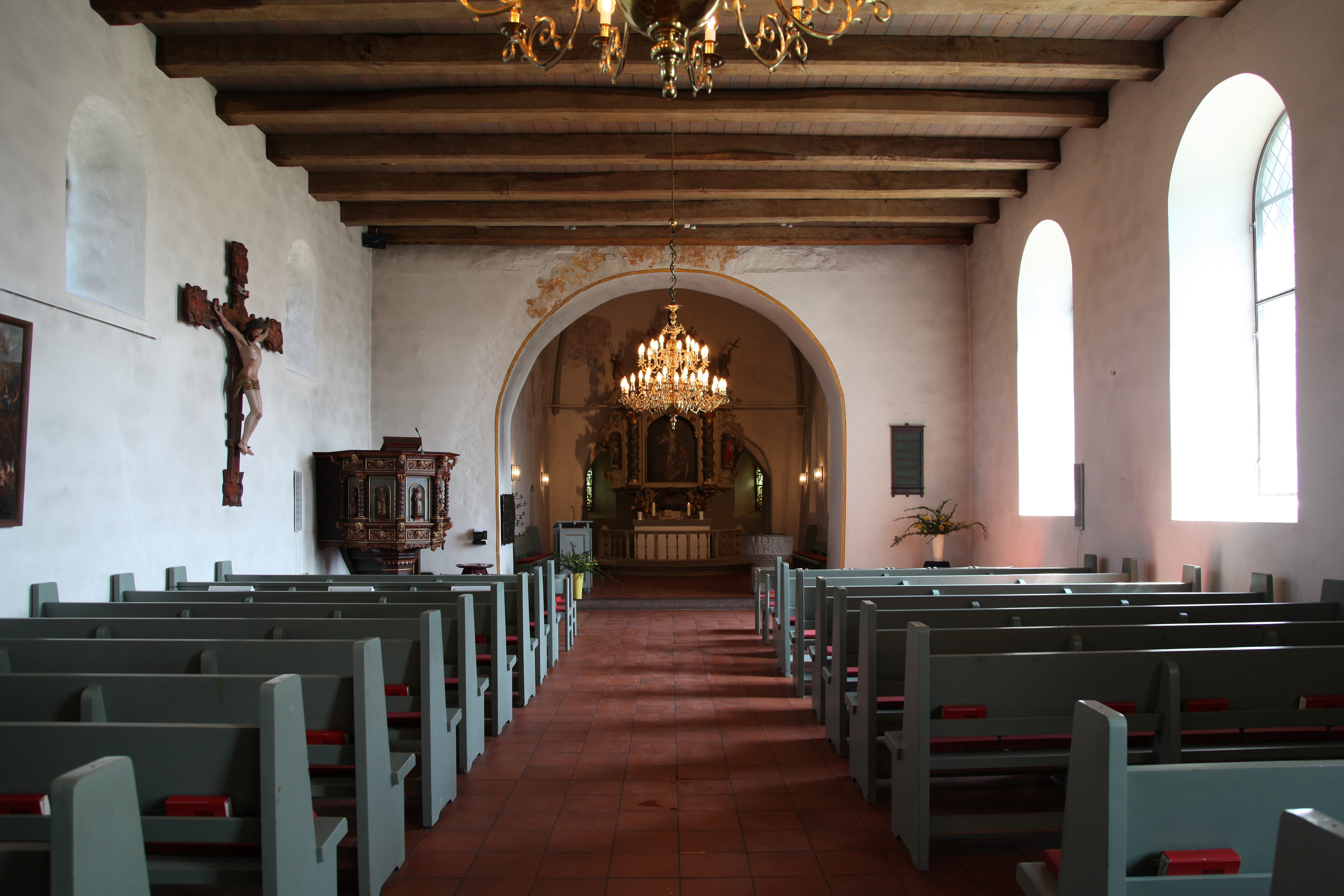 Borbyer Kirche, Bergstraße in Eckernförde